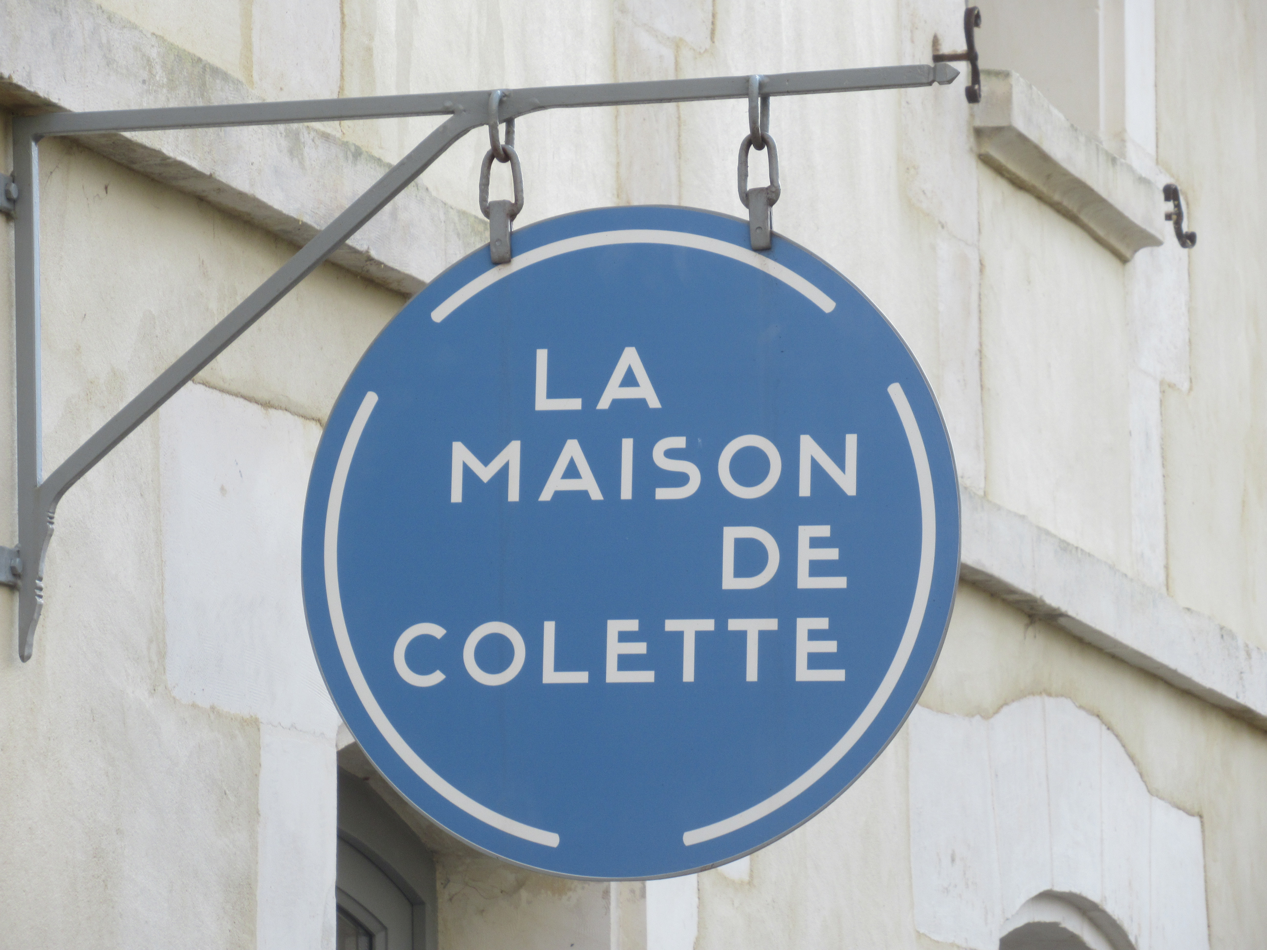 Panneau La maison de Colette, maison natale de Colette à Saint-Sauveur-en-Puisaye.